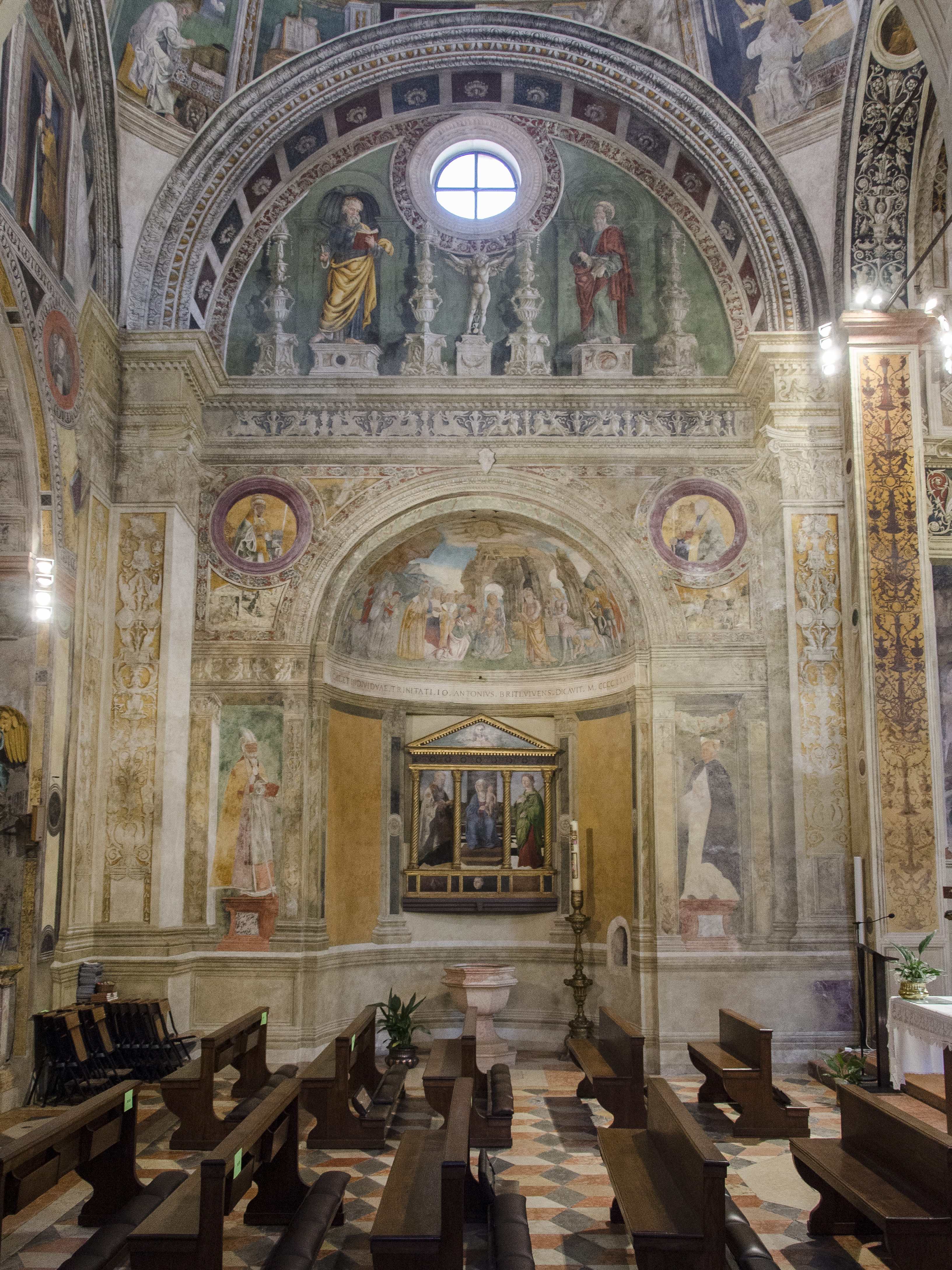 Chiesa dei Santi Nazaro e Celso a Verona. Interno, in stile rinascimentale.